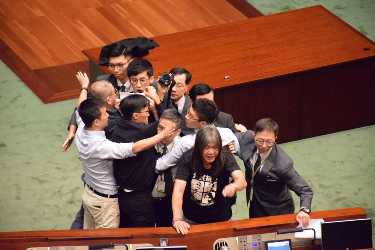 青年新政兩議員再闖立法會大會試圖宣誓不果（美國之音湯惠芸/海彥拍攝） 香港立法會大會11月2日再度因青年新政兩位議員要求宣誓就任而出現混亂情況。立法會主席在下午的會議上因所謂安全理由宣布休會。由於外界高度關注青年新政的梁頌恆和遊蕙禎再次宣誓的爭議，像上週三的立法會大會一樣，百多名媒體記者在立法會大會11點開始前，便等候在議事廳外或媒體和旁聽席。